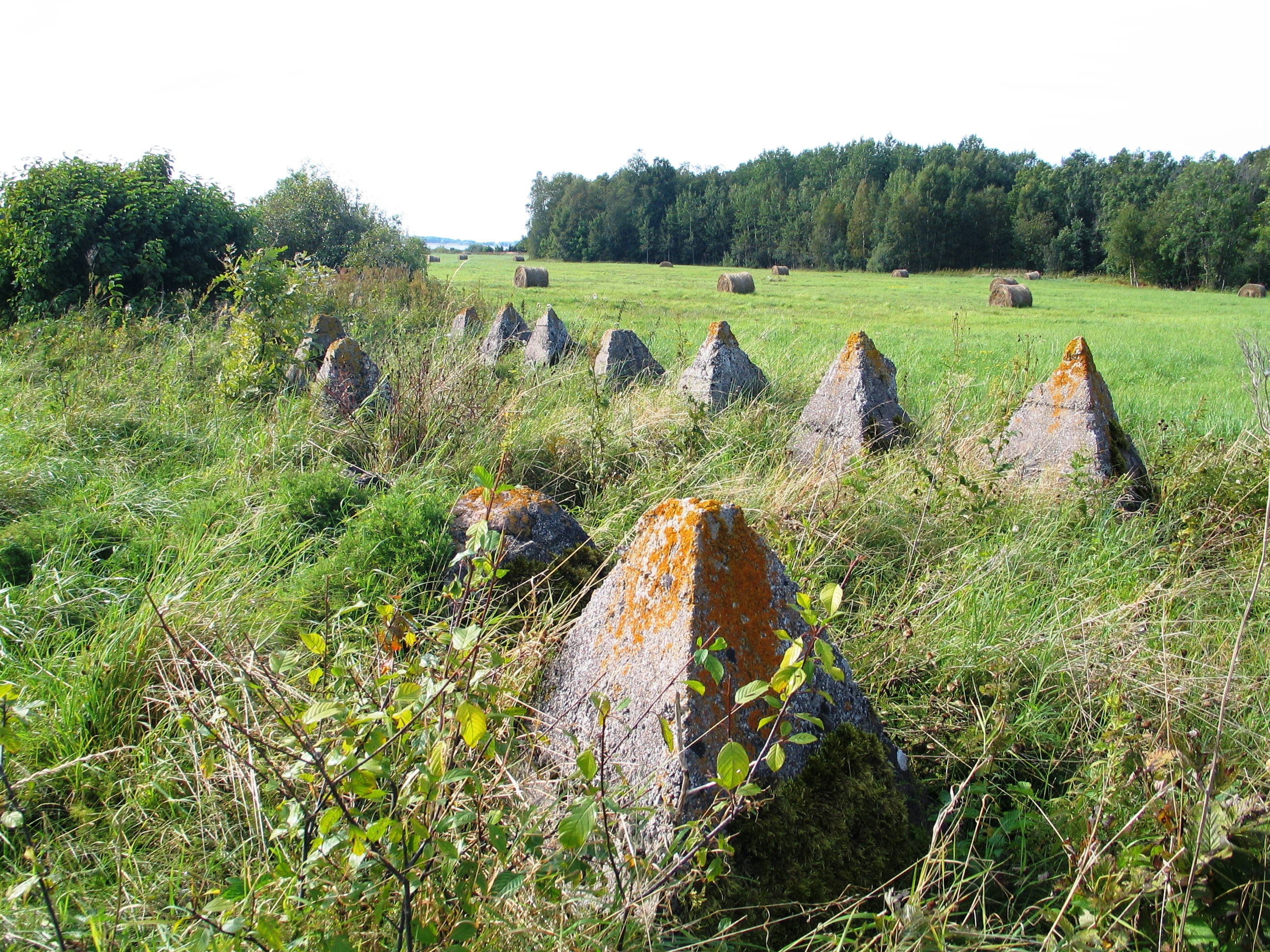 Lõpe-Kaimri tankitõrjeliin, ehitatud 1941.